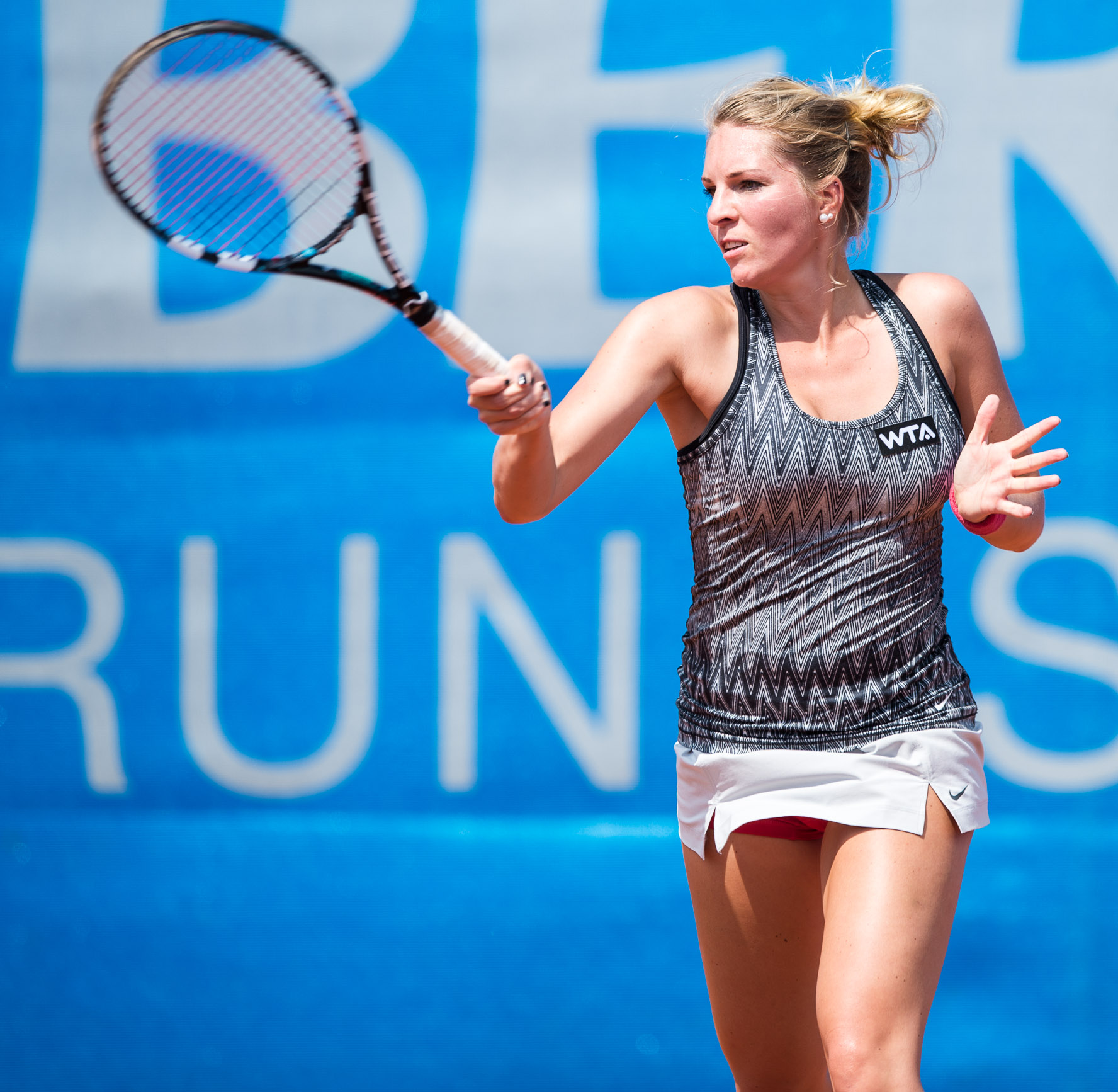 Damentennis,Nina Zander,Nürnberger Versicherungscup 2014,Tennis,WTA